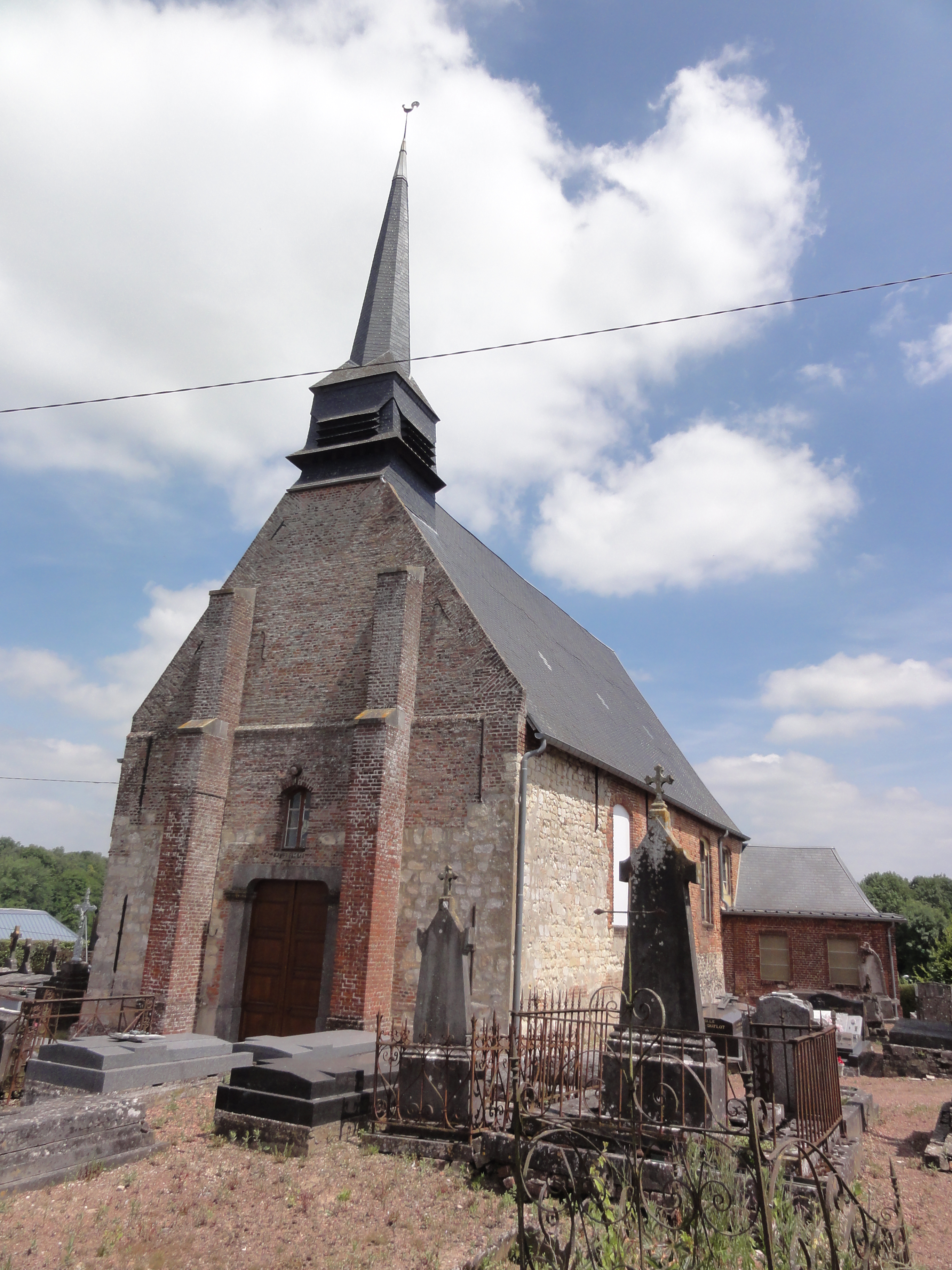 ron (Aisne) église